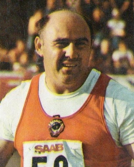 SPORT VEDETTES-PANINI 1974-Figurina n.33- BONDARCHUK- URSS -ATLETICA LEGGERA-Rec